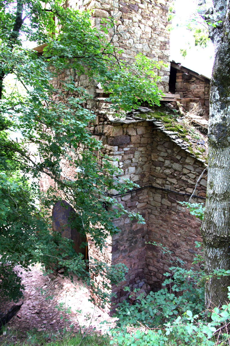 monestir de Sant Just i Pastor a Urmella (la Franja-Osca)